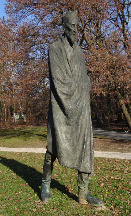 Spomenik Vladimiru Nazoru